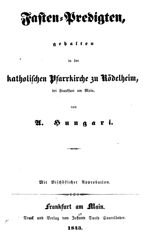 Anton Hungari (1809-1881), kath. Priester in Frankfurt, Buchautor und Dichter, Titelblatt eines Buches